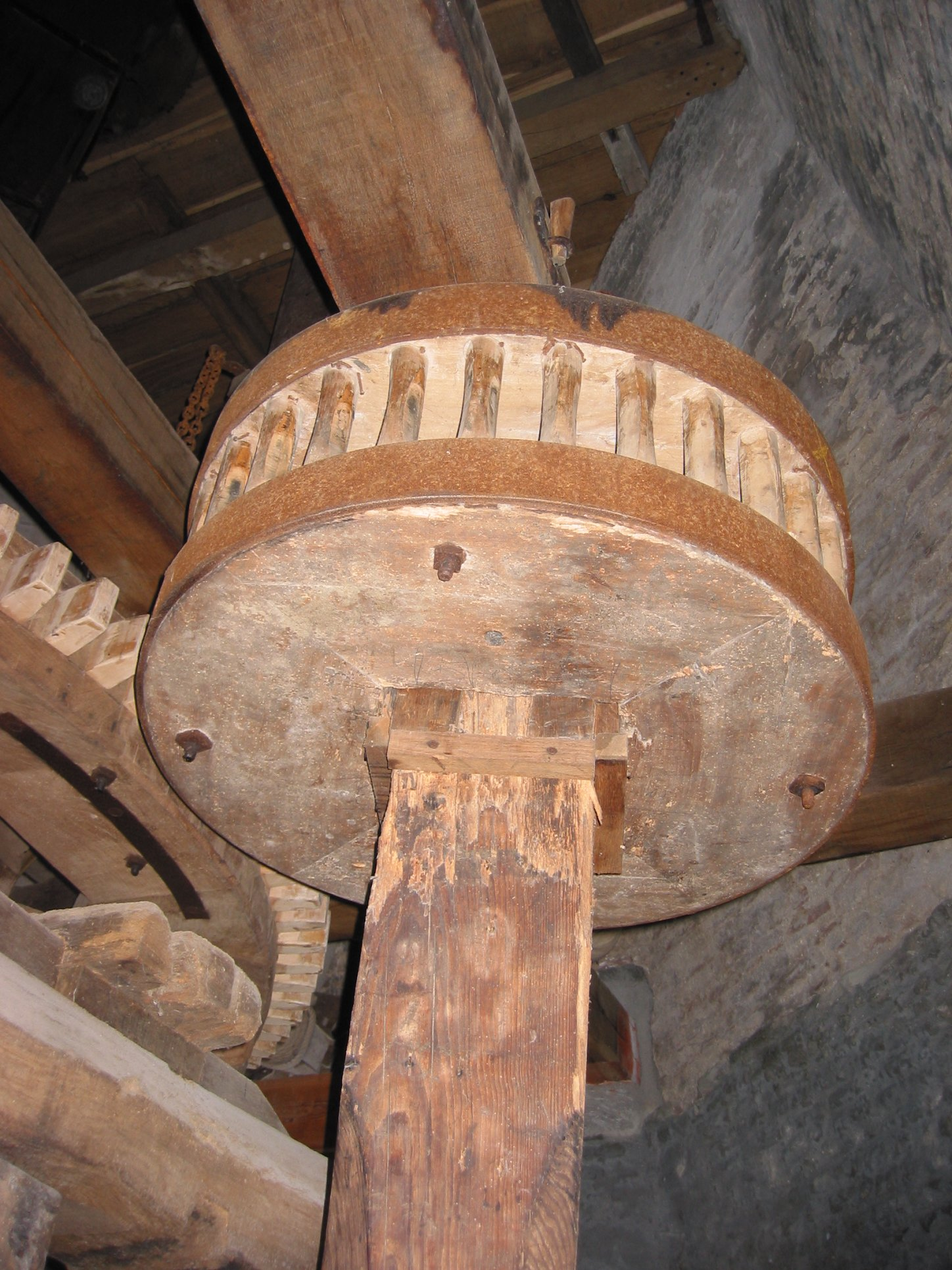 De Keetmolen aandrijving maalstoel rechts